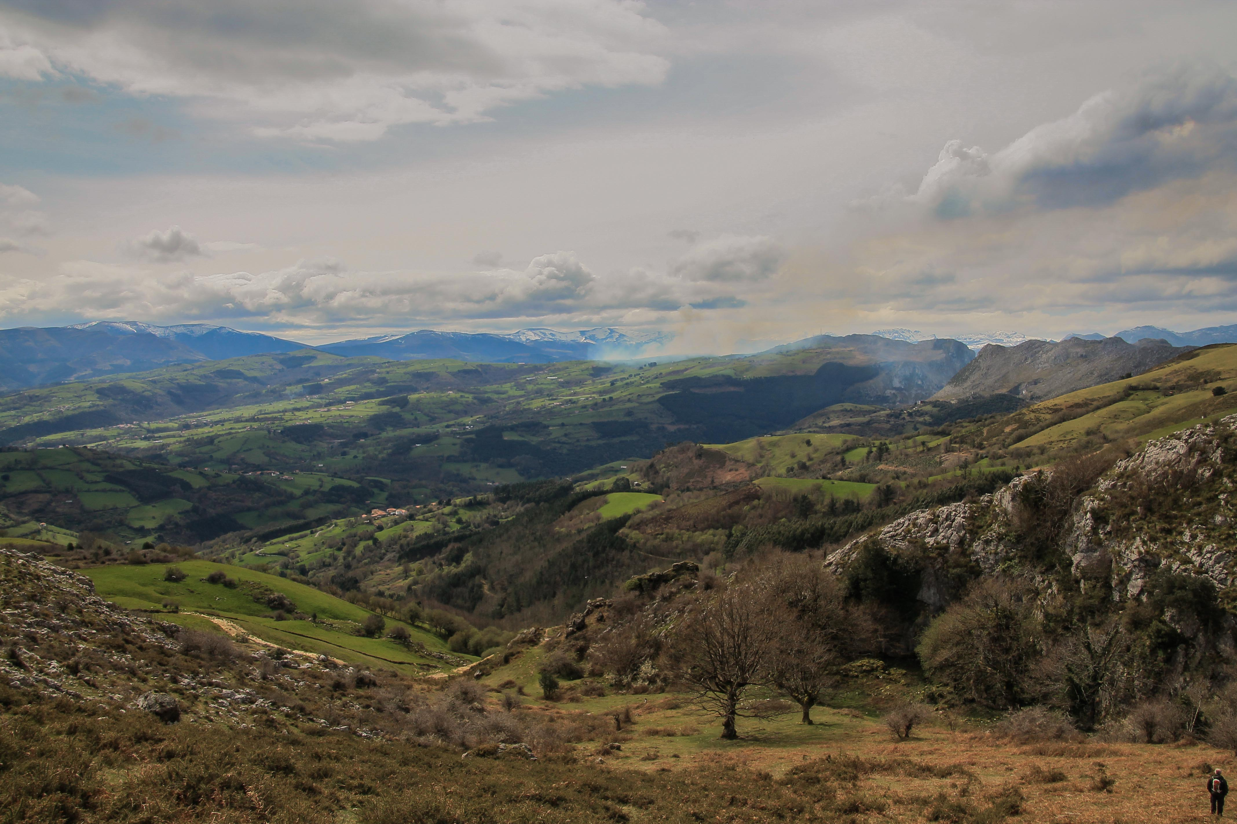 Armañón This is a photography of a Special Area of Conservation in Spain with the ID: ES2130001. Natura2000 entry, EEA entry